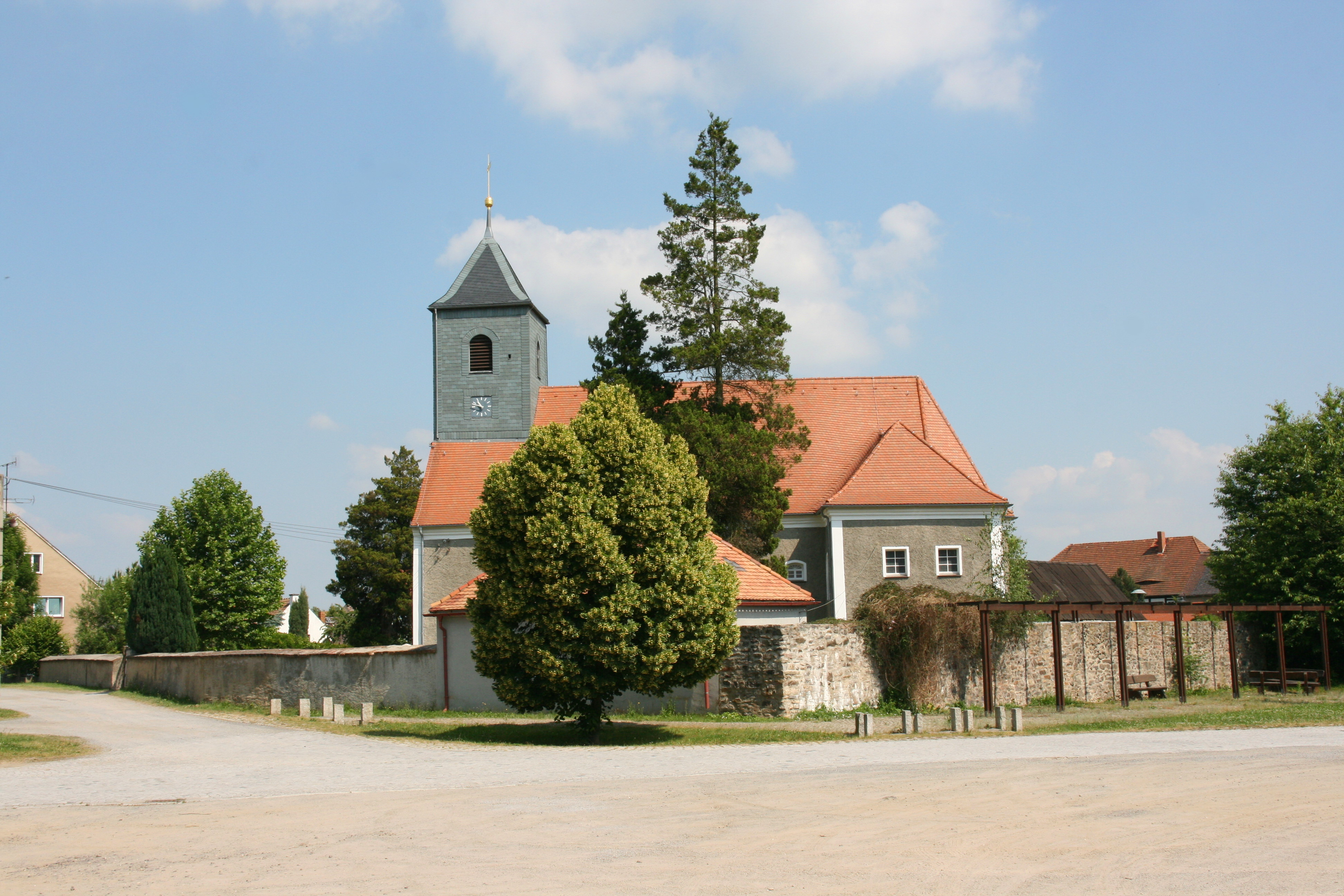 Evangelische Kirche, Am Auewald in Guttau